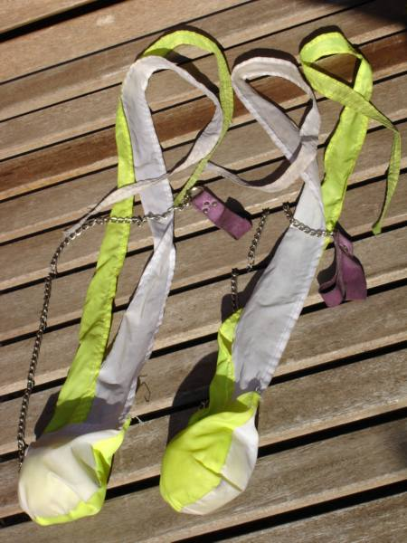 Comet-Poi